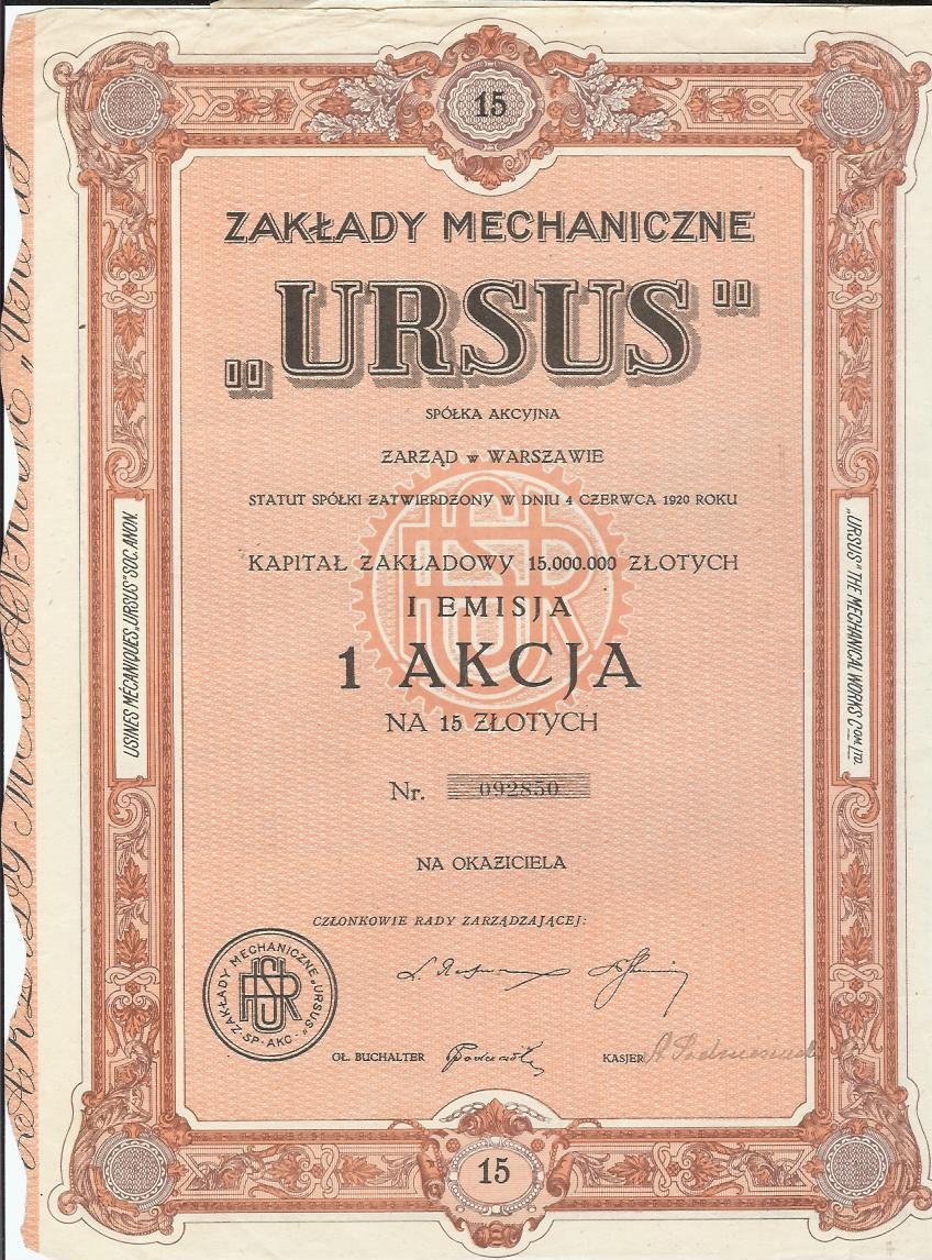 Aktie über 15 Zloty